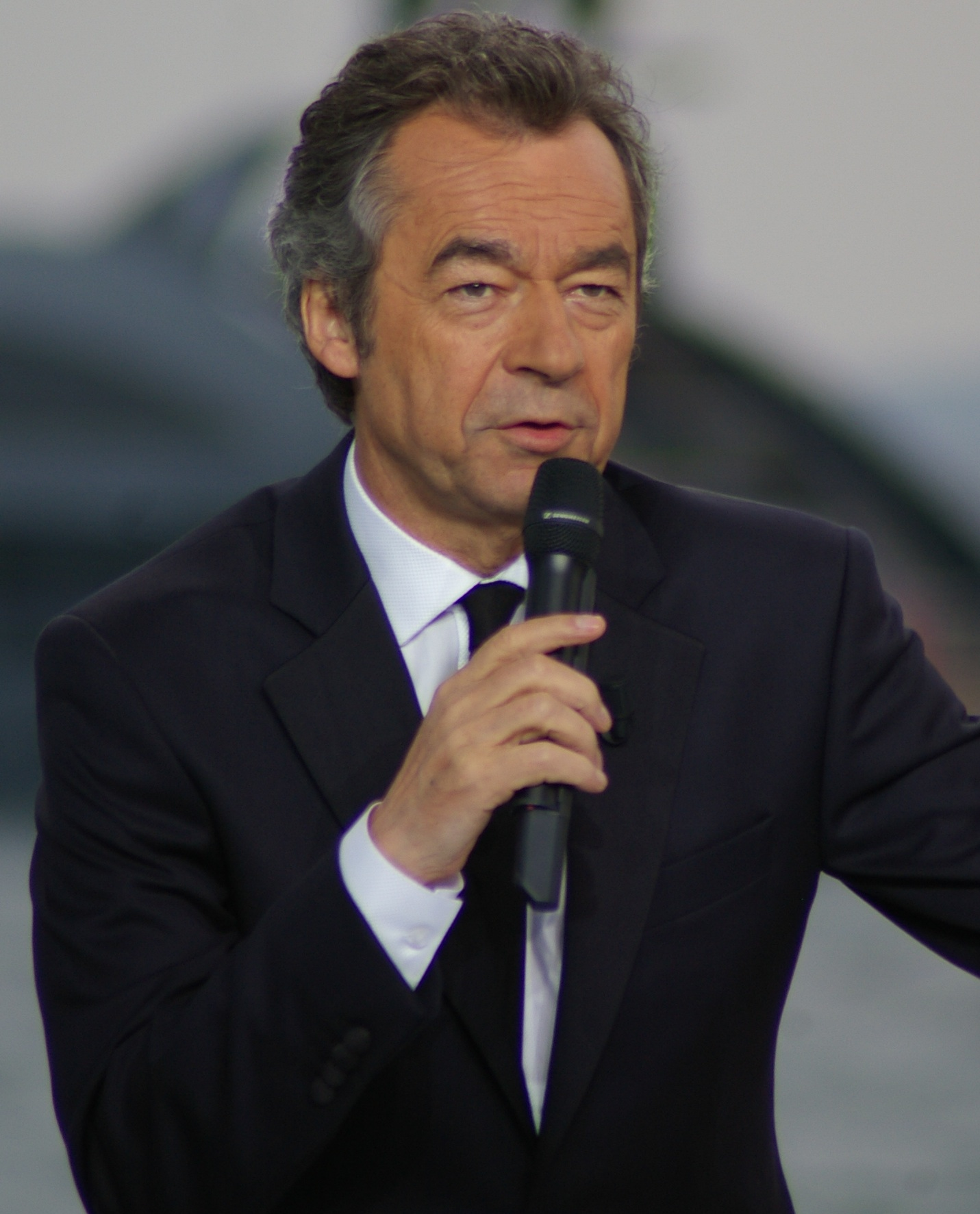 Michel Denisot animant Le Grand Journal sur Canal+ le 19 mai 2010 durant le festival de Cannes.